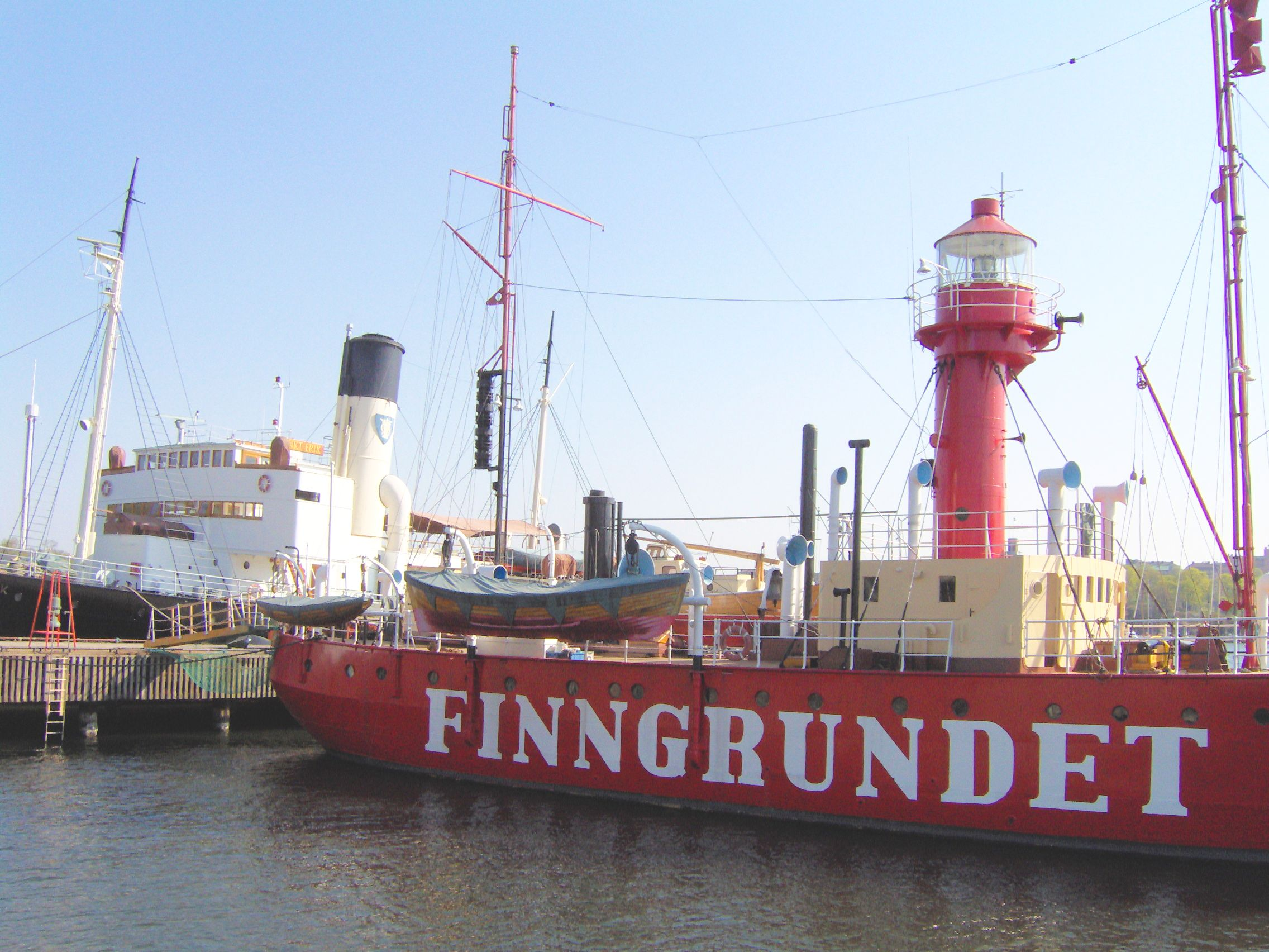 Museifartygen utanför Vasamuseet, Djurgården, Stockholm. The old ships at the Vasameseum at Djurgården in Stockholm, Sweden. 2006.